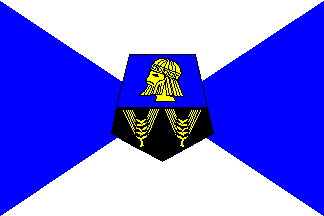 Drapeau du Wilaya de Tanger